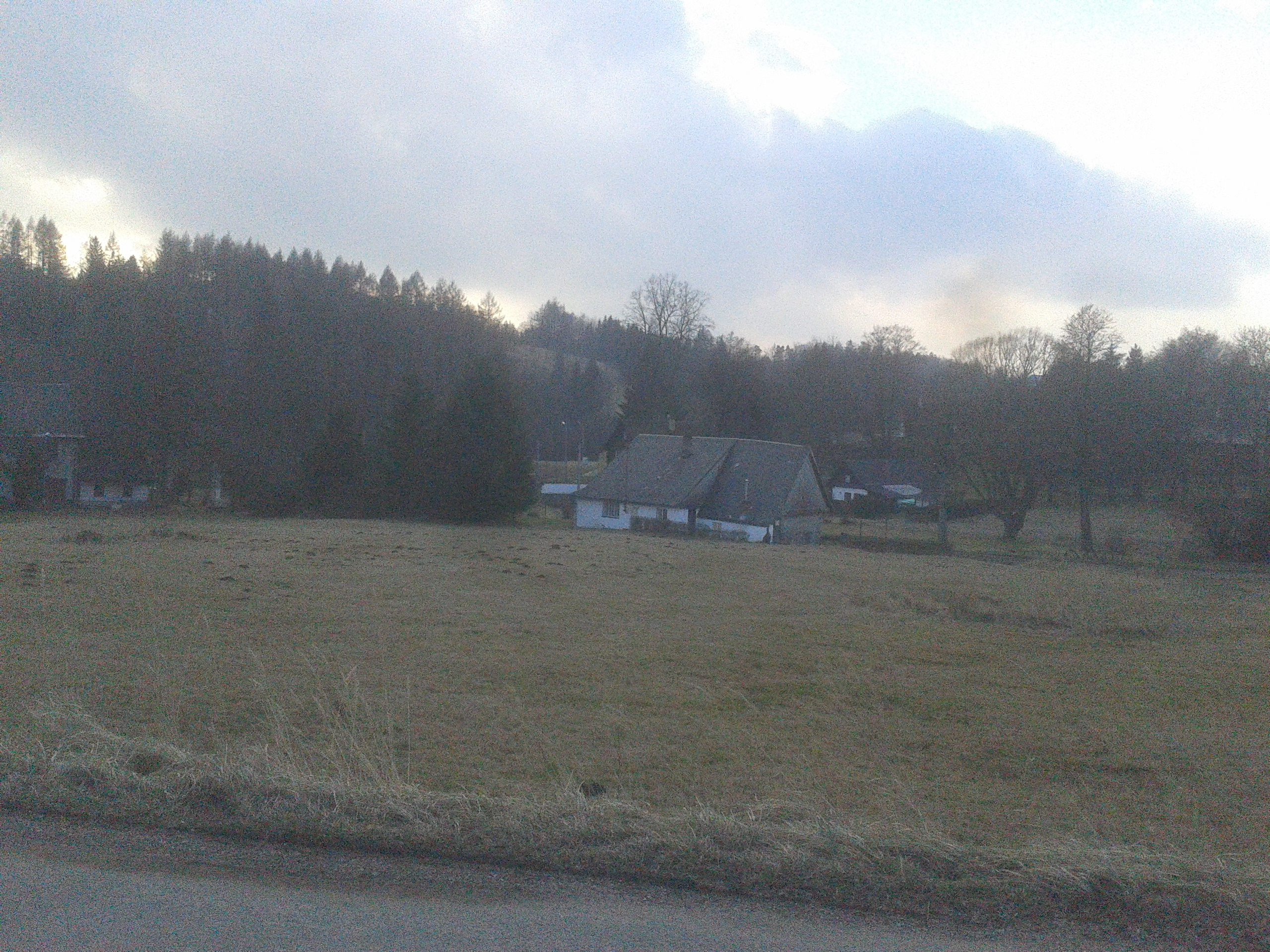 Stavení Koburk